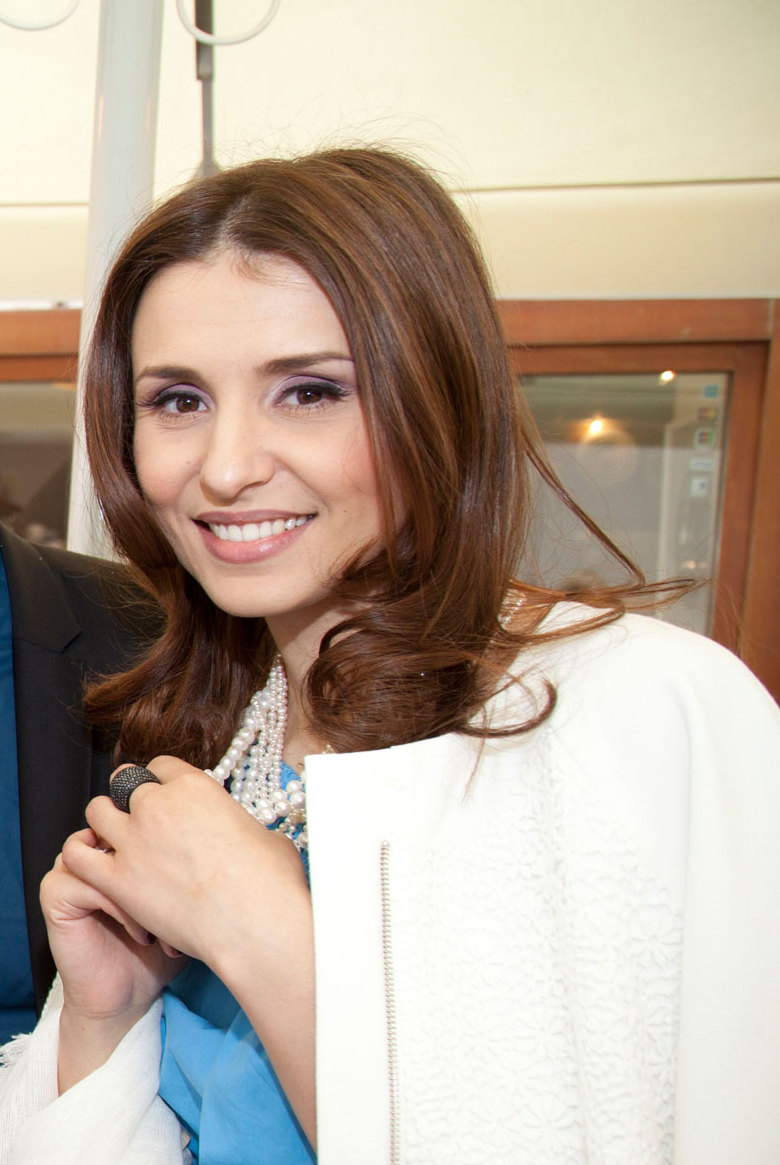 Ingerl_Irina,Nafornita_Valentina,Dogotari_Mihail,Krupina_Irina-4419